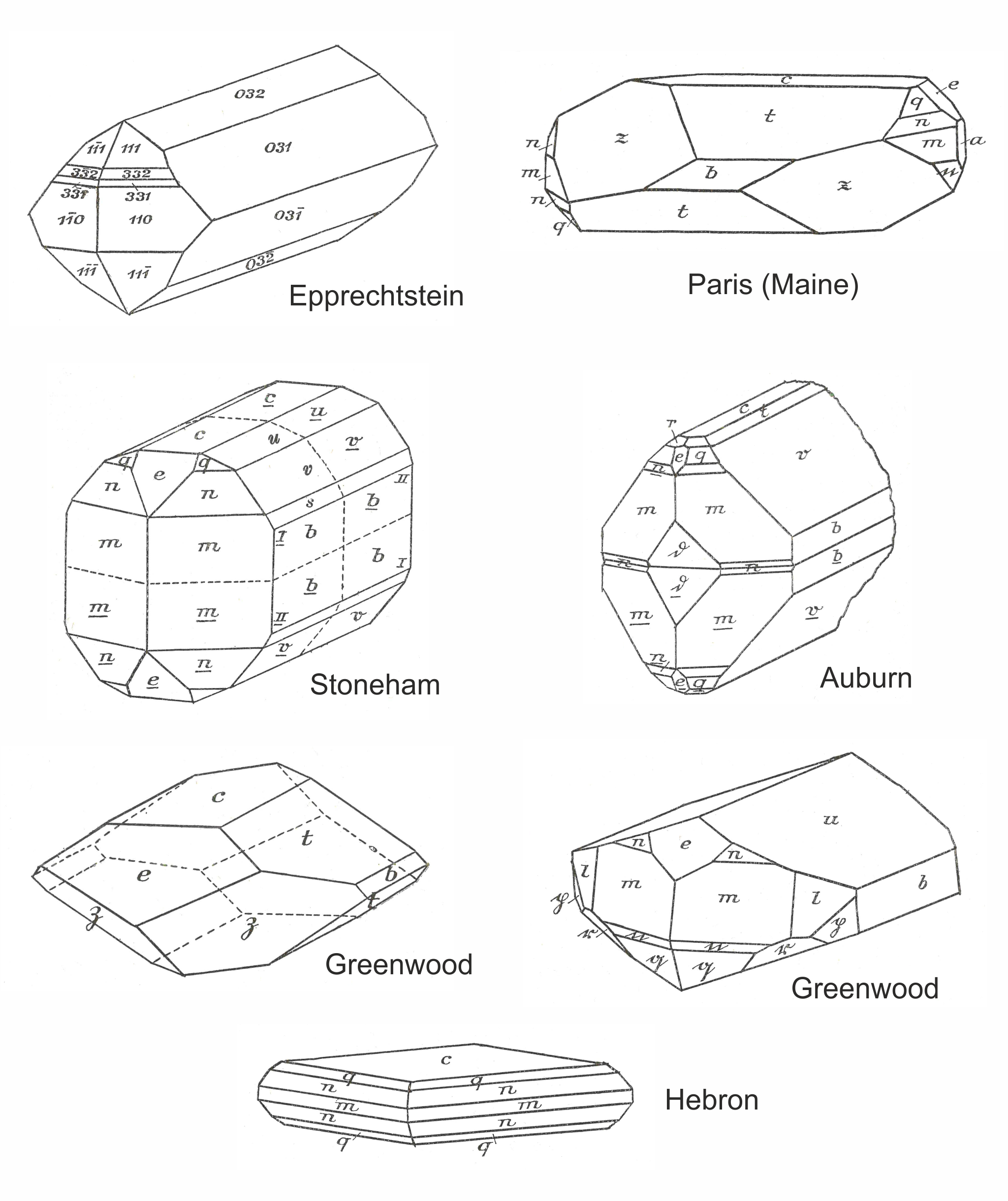 Zusammenstellung von Kristallzeichnungen von Hydroxylherderit-Kristallen aus V. Dürrfeld (1910), Zeitschrift für Kristallographie und Mineralogie, Band XLVII, Tafel VIII, und Samuel L. Penfield (1894), American Journal of Science, Vol. CXLVII, Plate VIII